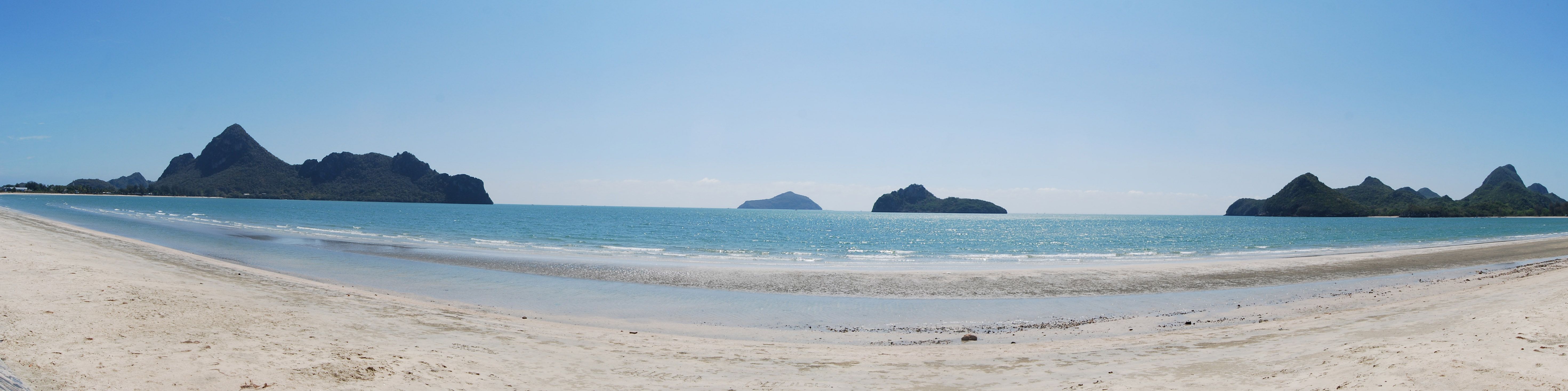 ภาพถ่ายมุมกว้าง ของอ่าวมะนาว